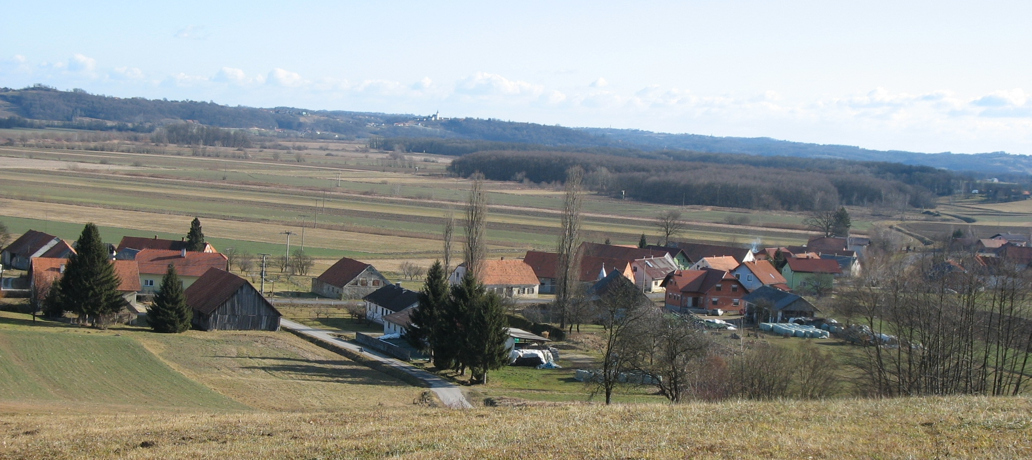 Pogled na vas Gočova